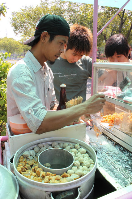 pedagang pentol